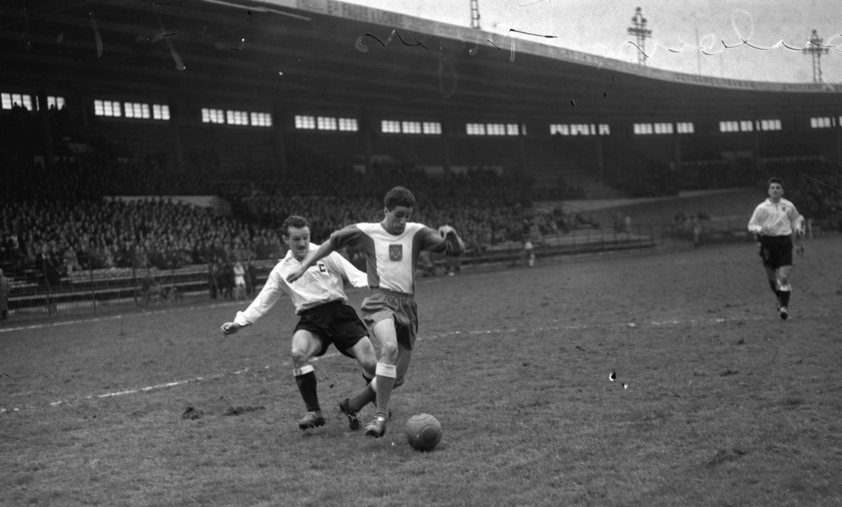 Stadium municipal de Toulouse, 1bis allées Gabriel-Biénès. 27 Janvier 1957. Vue d'un duel entre le toulousain Brahimi et un joueur d'Angers.